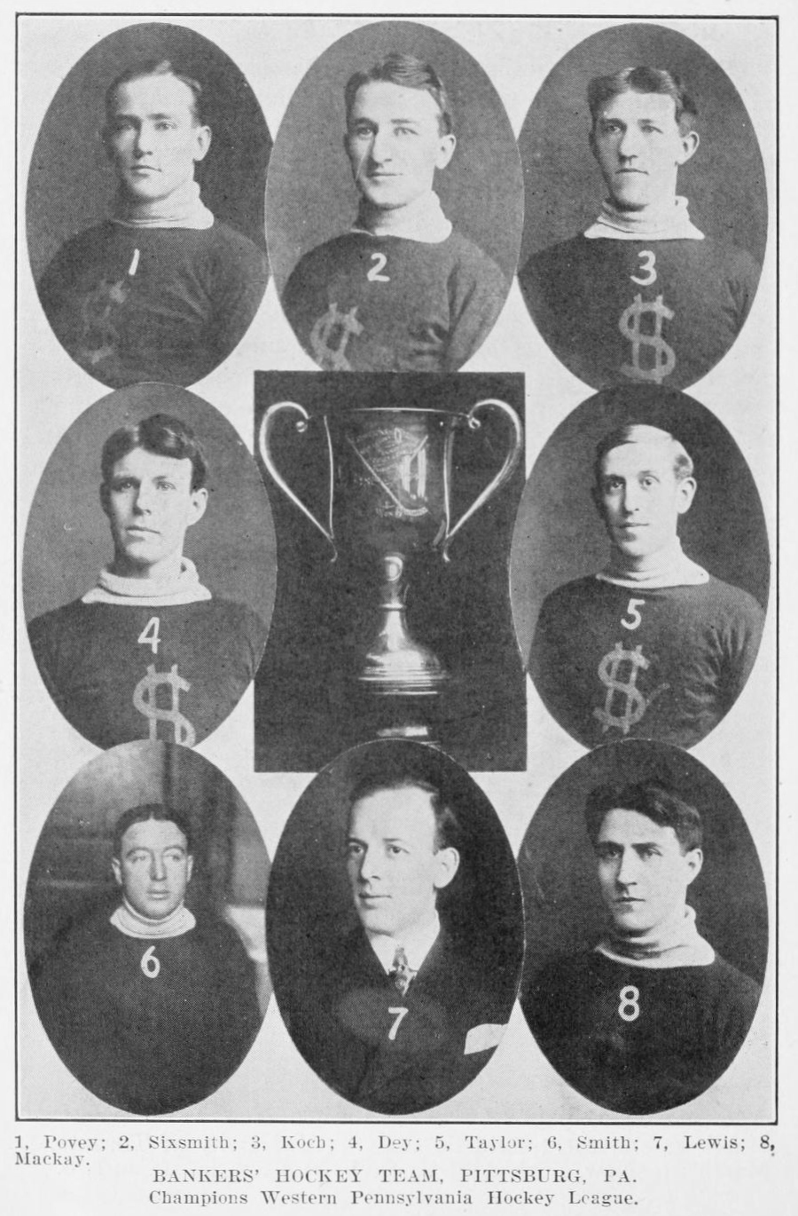 Ice hockey club Pittsburgh Bankers, champions of the Western Pennsylvania Hockey League for the 1907-08 season. Numbered, from 1 to 8; Fred Povey, Art Sixsmith, Angus "Dutch" Koch, Edgar Dey, Dunc Taylor, Harry Smith, Lewis, Jim MacKay.